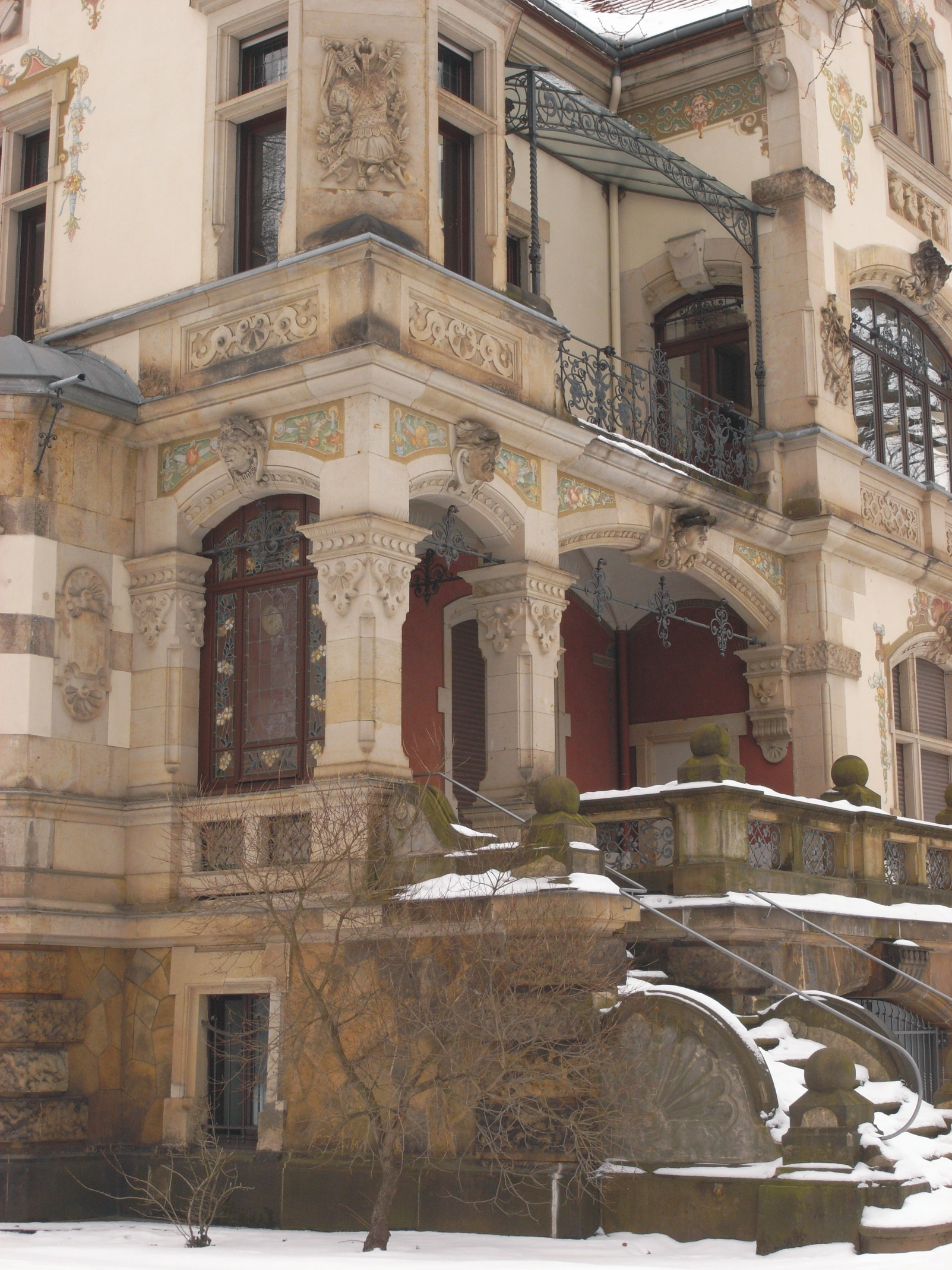 Dresden-Blasewitz, Villa Weigang - Nordost-Ecke/Gartenseite, Goetheallee 55 (Deutschland, Sachsen), heute Standesamt